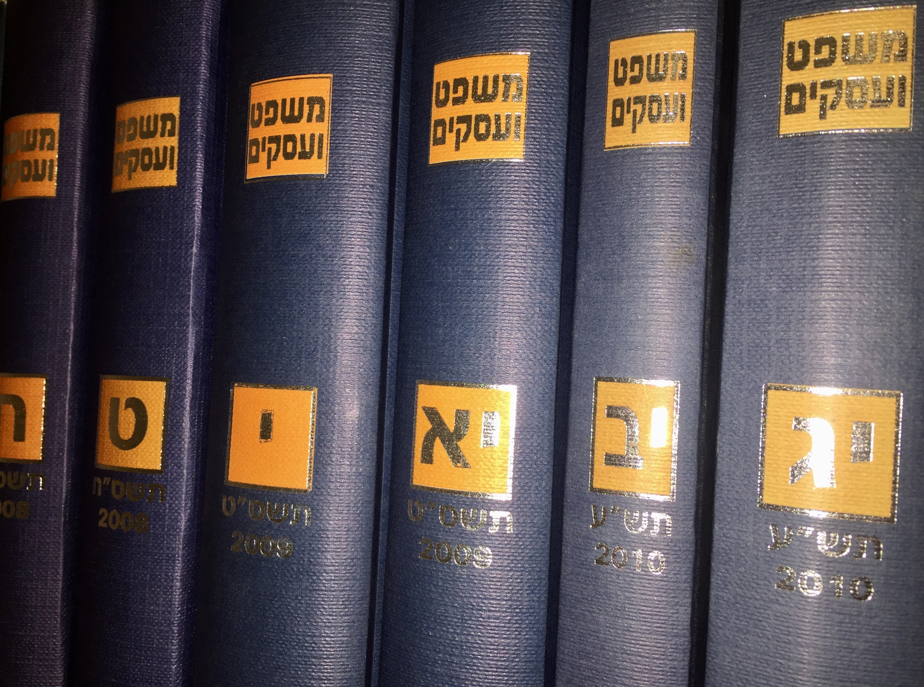 כרכי כתב-העת "משפט ועסקים"